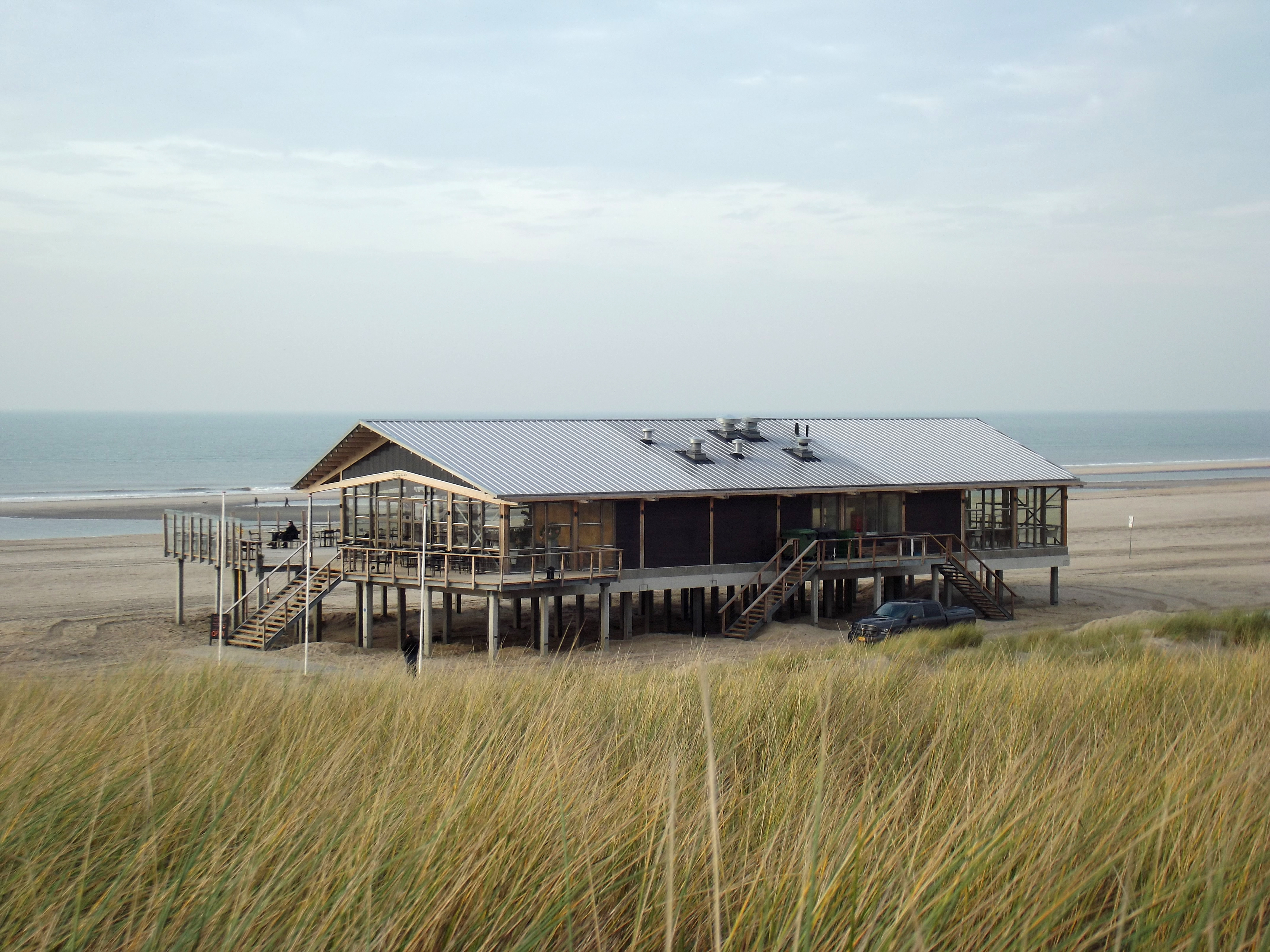 Bij een strandtoegang bij Ter Heijde is door de gemeente Westland een bouwvergunning afgegeven voor de bouw van een permanente strandtent op hoge steunpijlers om de golven bij stormen te weerstaan. In het zomerseizoen is de strandtent alle dagen geopend. In de winter de meeste dagen.